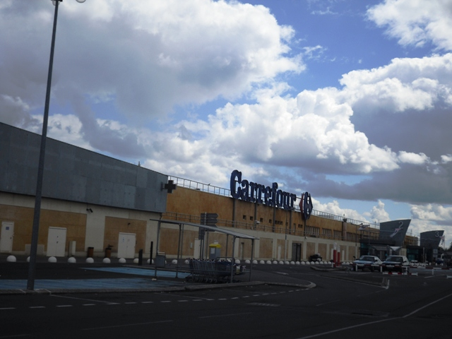 Le centre commercial Carrefour d'Athis-Mons (91)